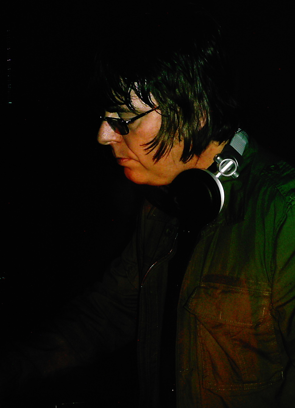 top dj!